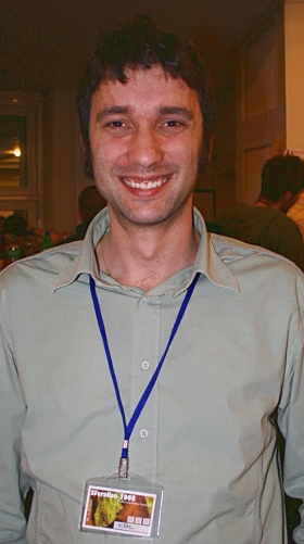 Krešimir Mišak pijan na SFeraKonu u Zagrebu